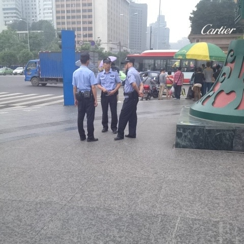 中文（中国大陆）: 2013年5月6日，仍有大量警察在天府广场执勤，以防止民众发起针对成都PX项目的游行示威活动。